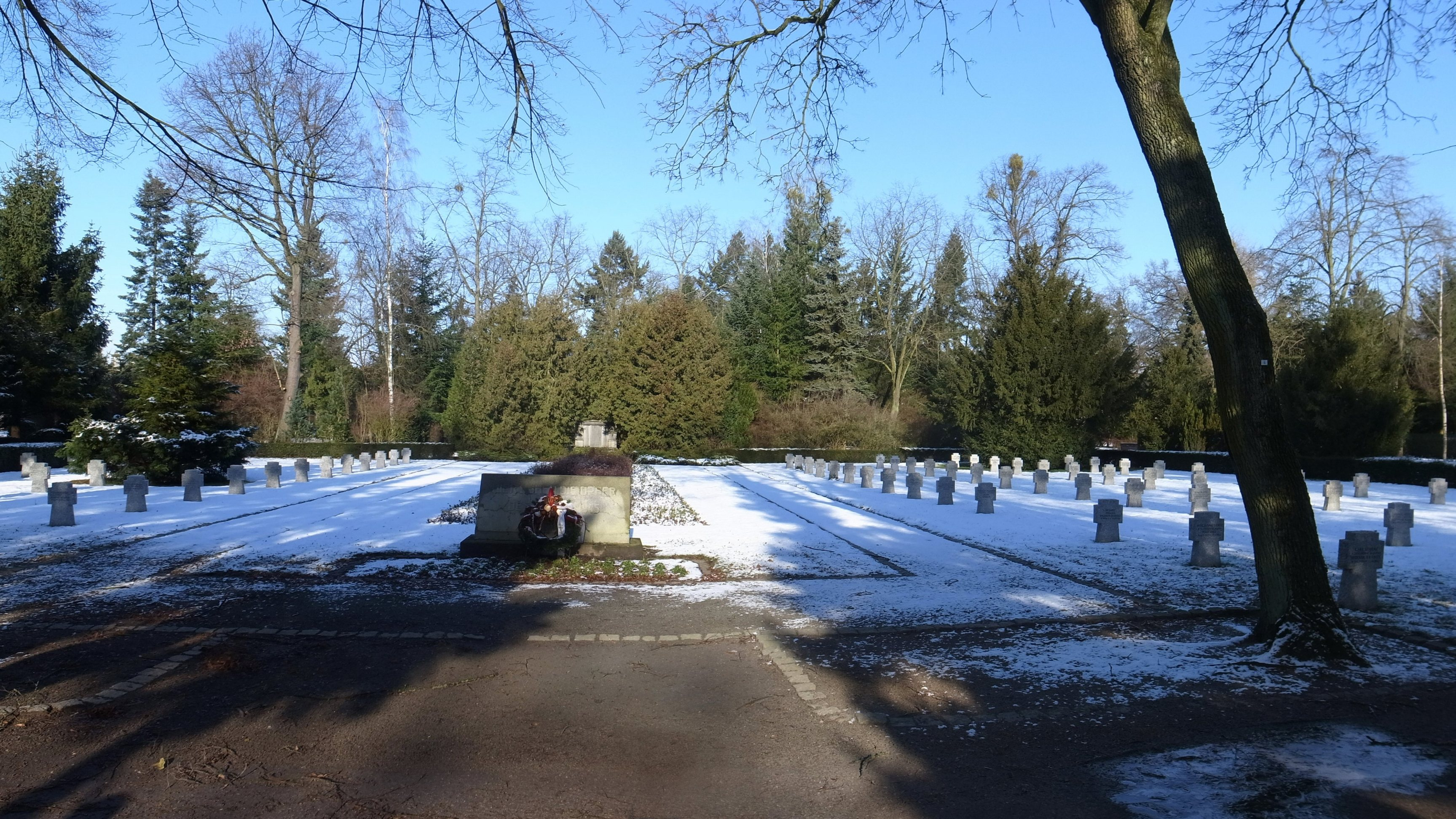 Zerbst/Anhalt, Gräberfeld und Denkmal zur Erinnerung an die Zerstörung der Stadt am 16.04.1945 auf dem Heidetorfriedhof.